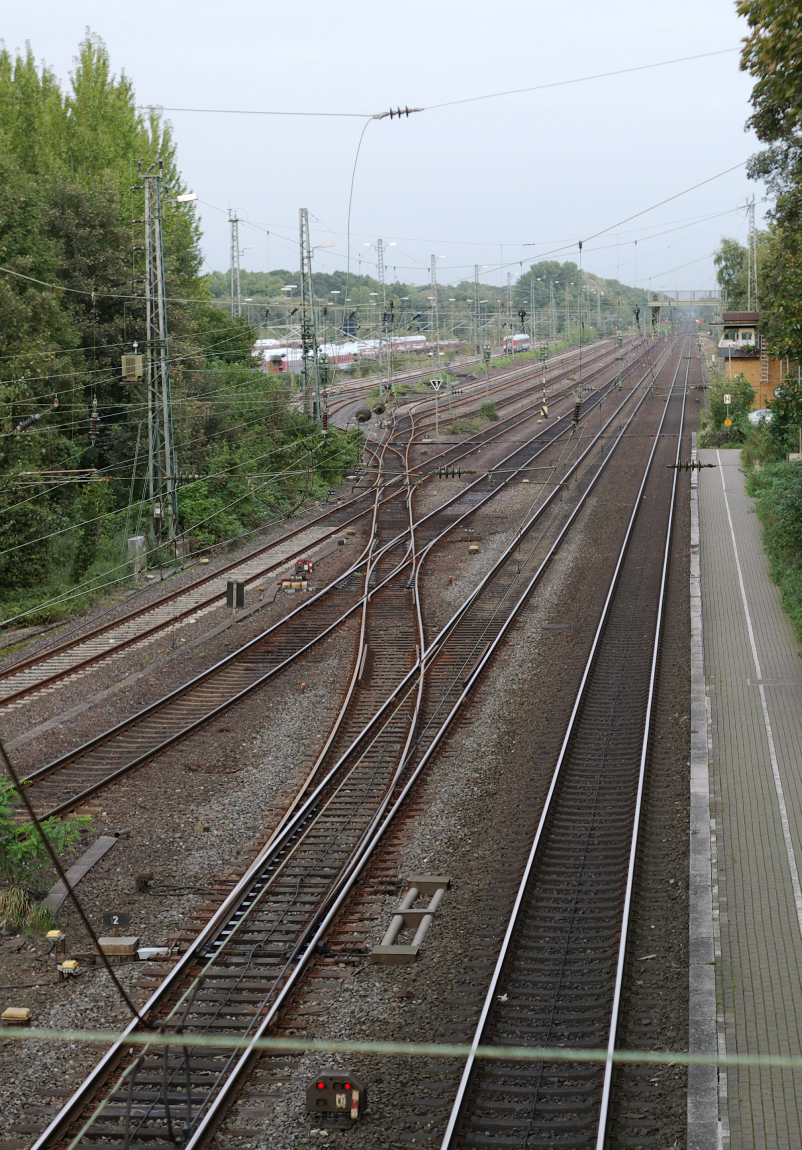 Bahnhof Dortmund-Scharnhorst, Doppelkreuzungsweichen in der Zufahrt zu den Rangier/Abstellgleisen